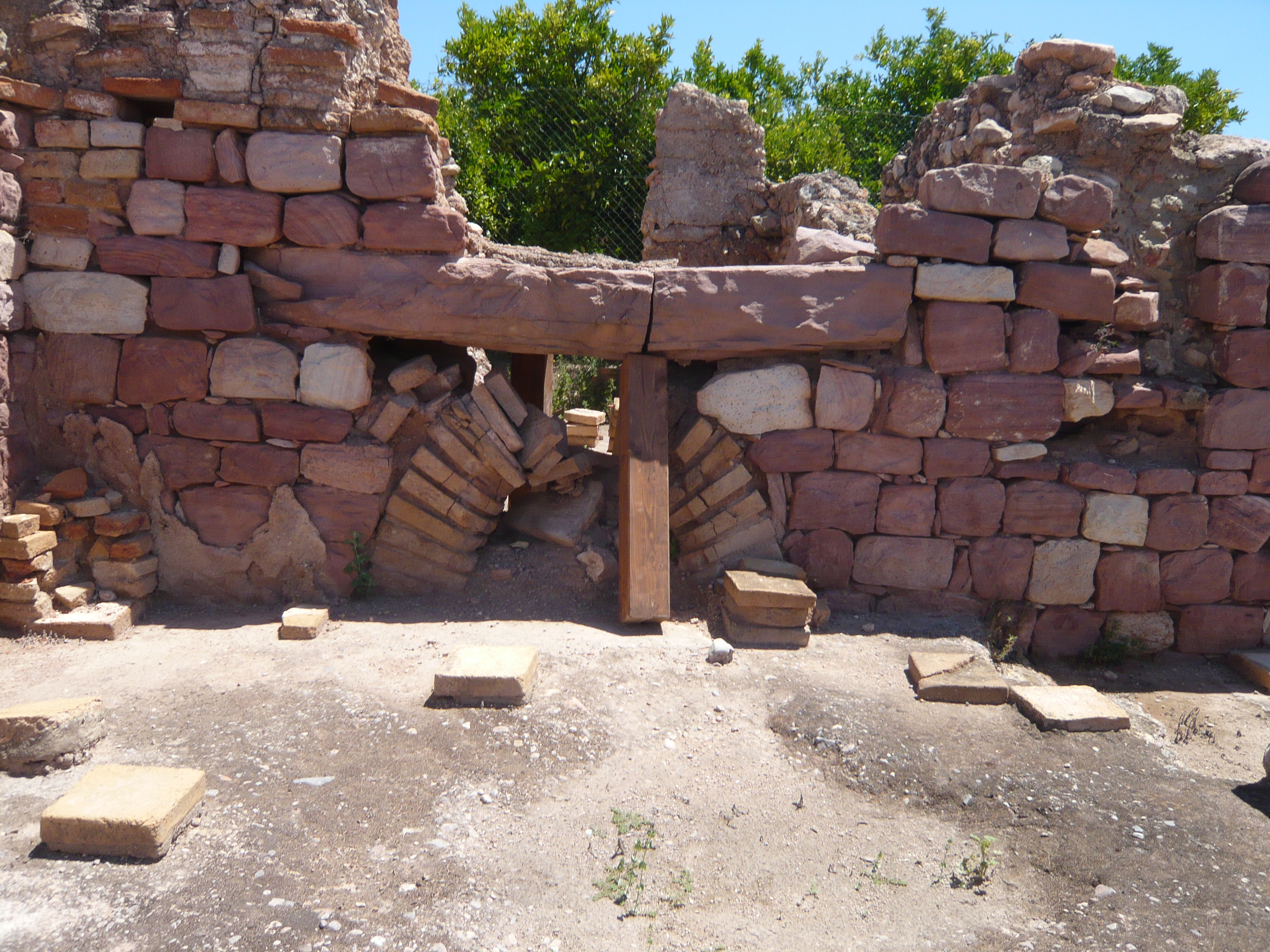 Jaciment romà de l'Horta Vella, Bétera, València. Termes